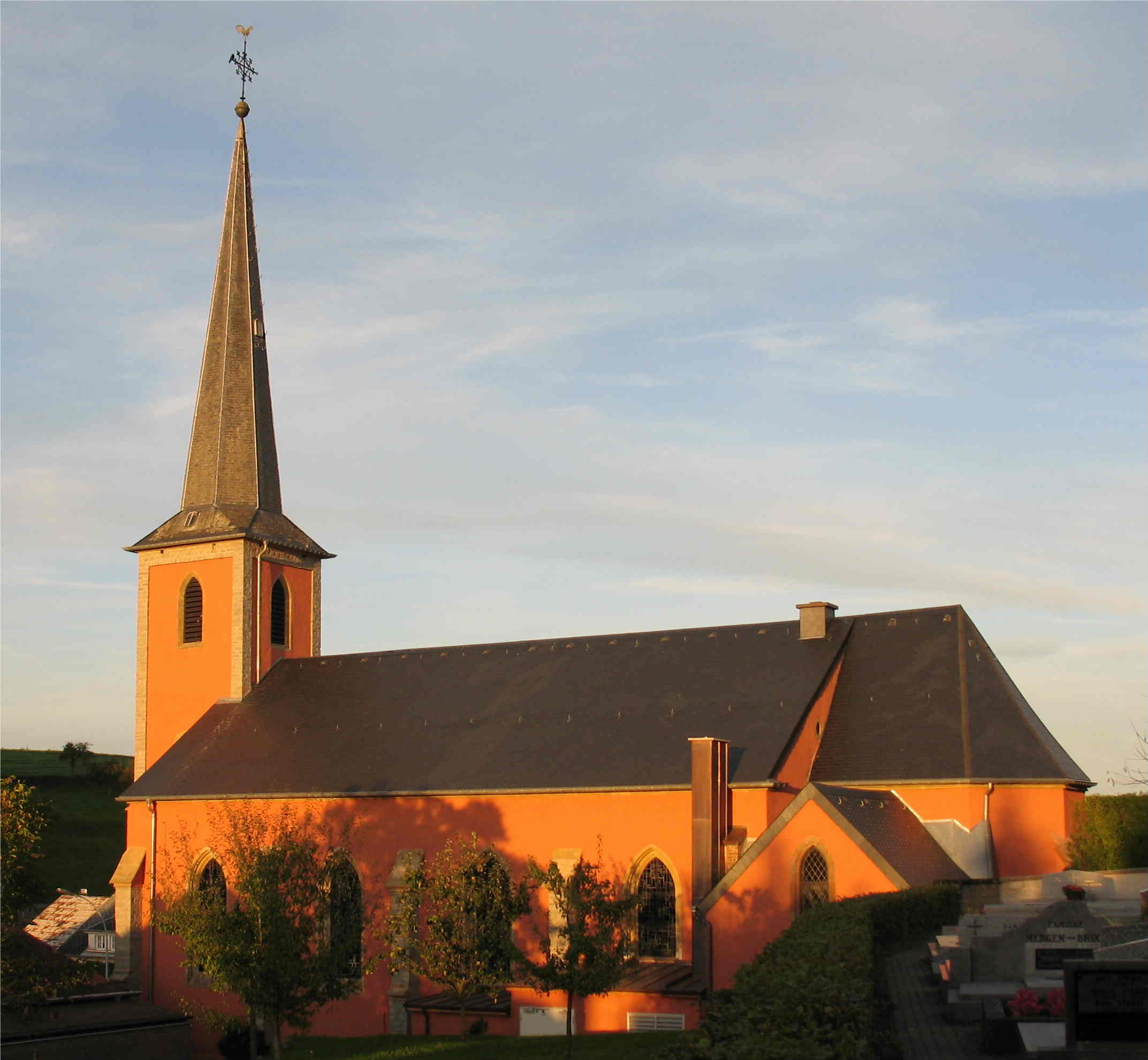 L'église de Boevange-sur-Attert (Luxembourg)